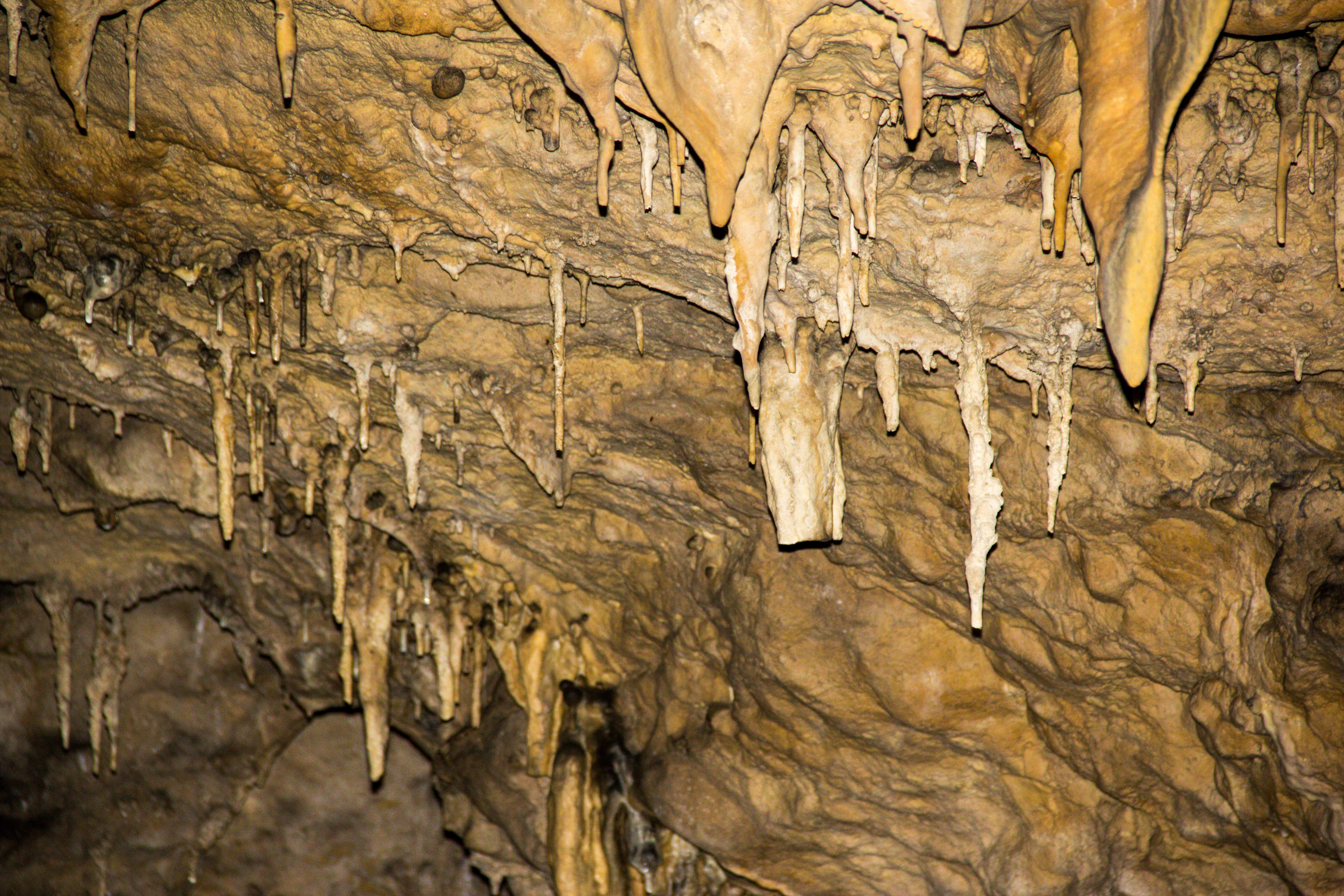 Rosenmüllerhöhle, Muggendorf, Vandalismus an Tropfsteinen